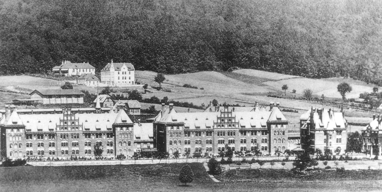 Kurhessenkaserne